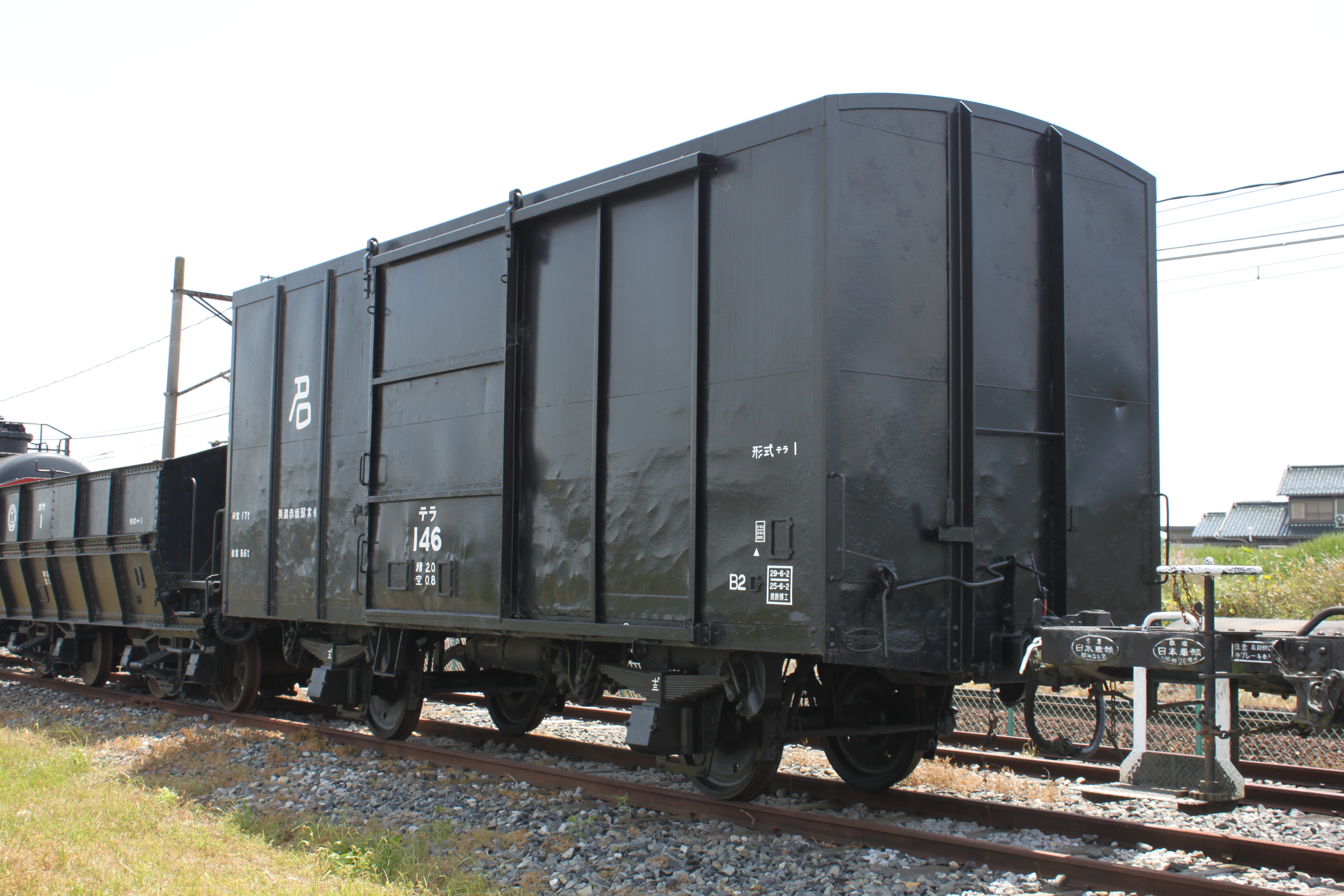 日本国有鉄道テラ1形貨車テラ146